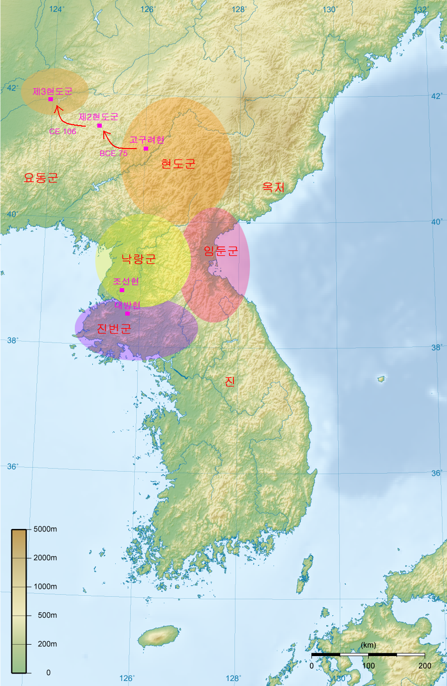 현도군 이동